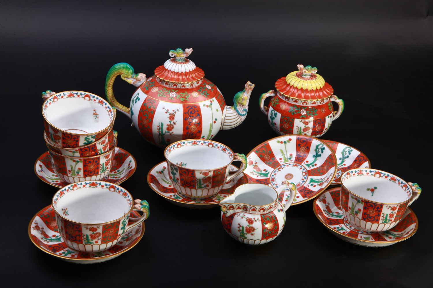 Σετ τσαγιού Herend με διακόσμηση δράκου του τύπου Gödöllő